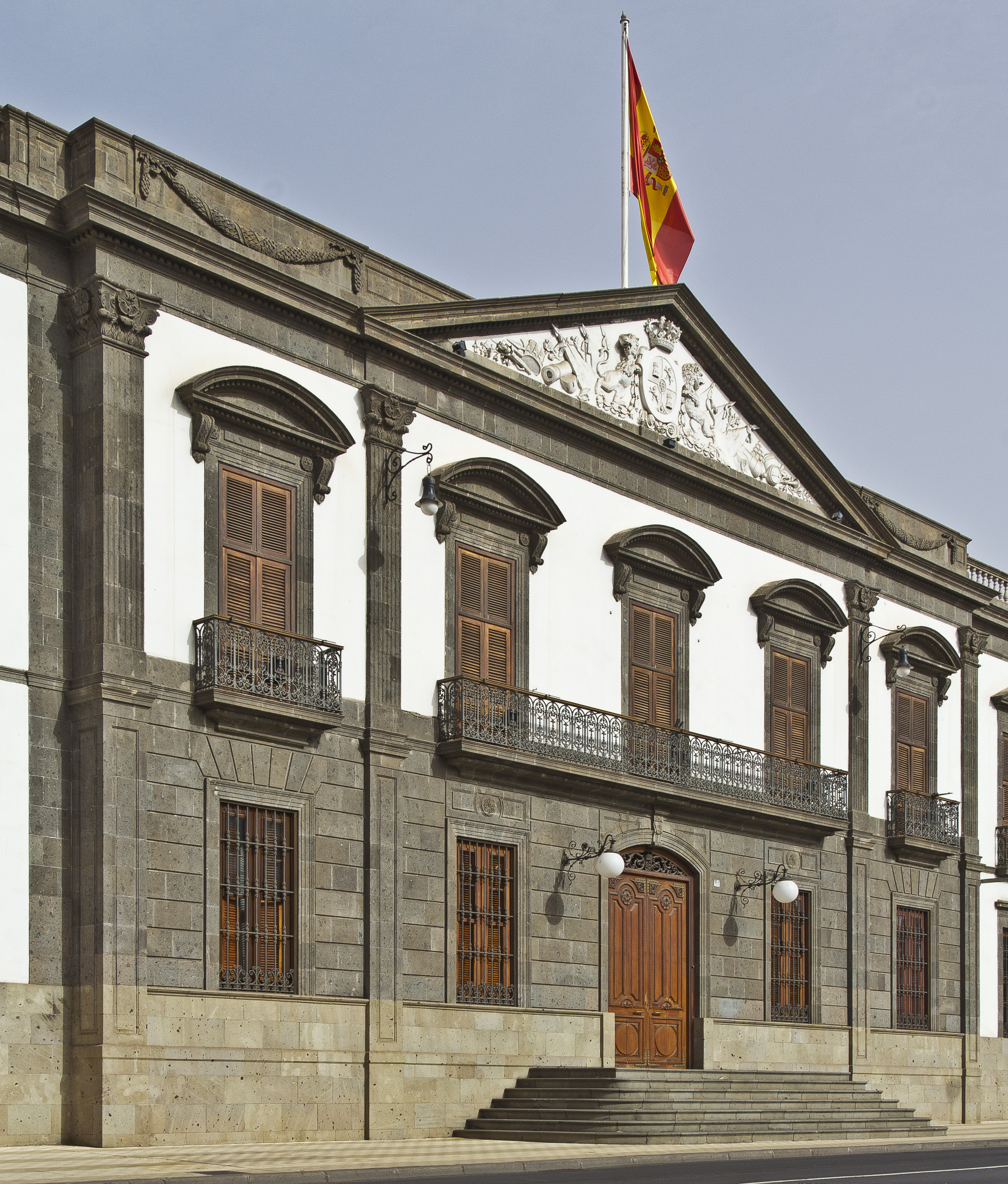 Der Palacio de la Capitanía General de Canarias an der Plaza Weyler in Santa Cruz de Tenerife wurde im Jahr 1880 fertiggestellt.